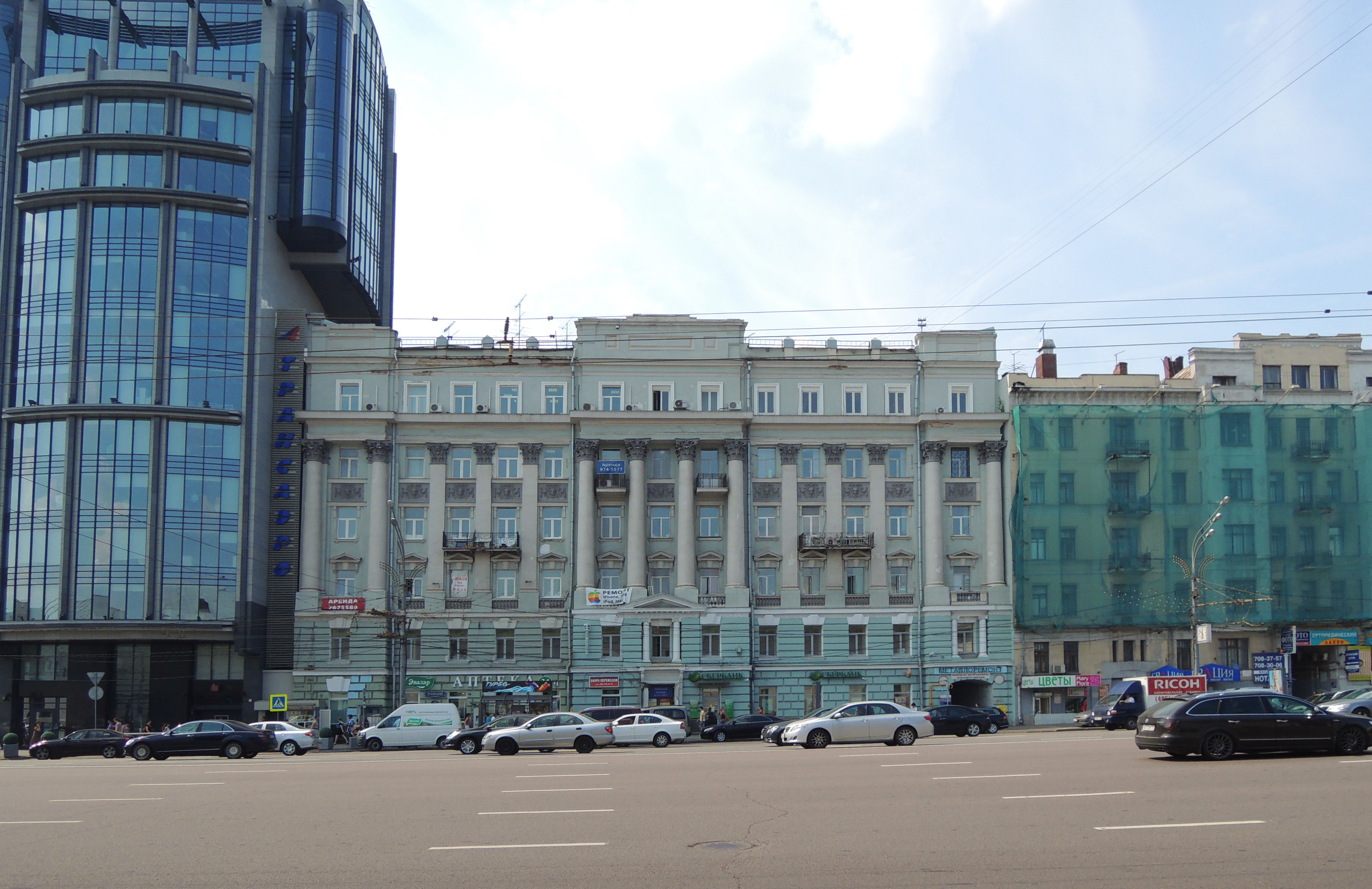 Zubovsky Boulevard